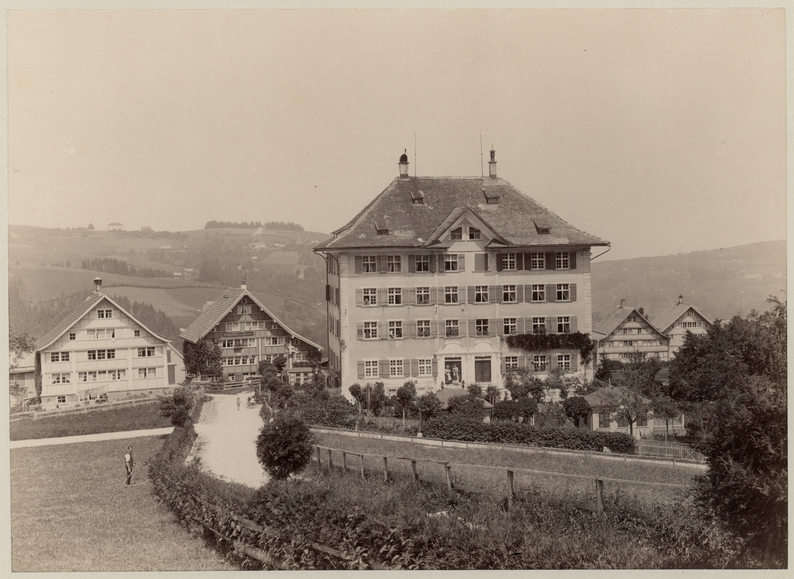 Ansicht des Honnerlagschen Doppelpalastes in Trogen (Nideren 2/4) aus Südosten